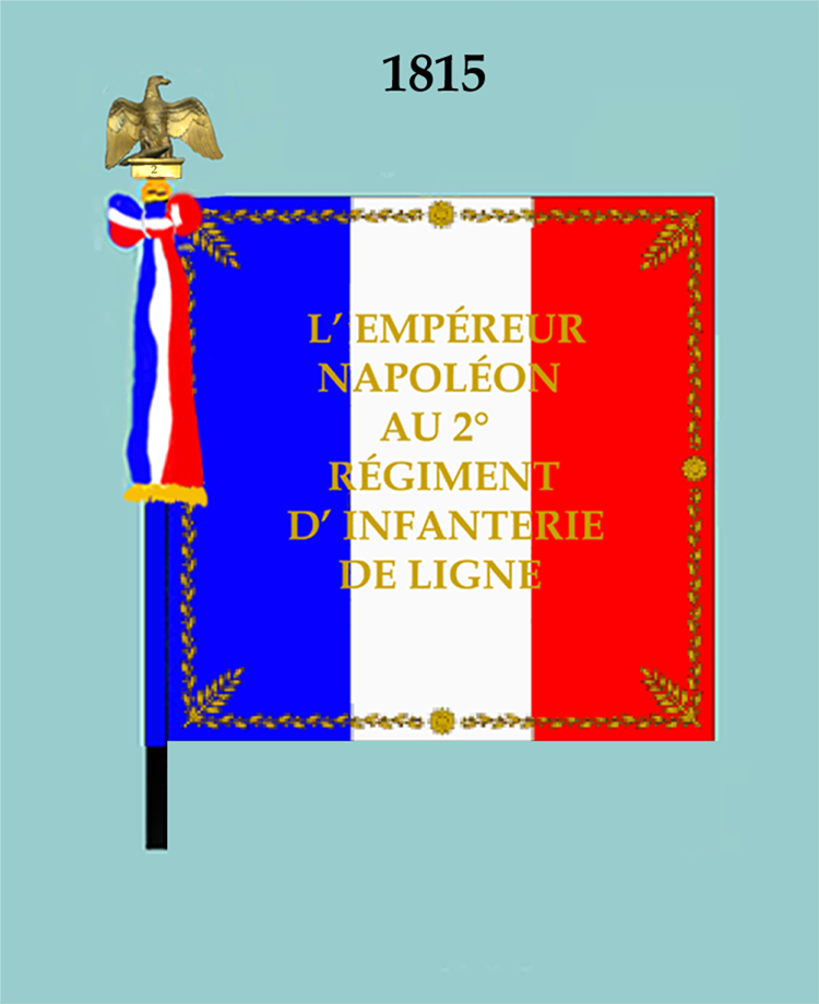 Drapeau 2e régiment d' infanterie de ligne modéle de 1815